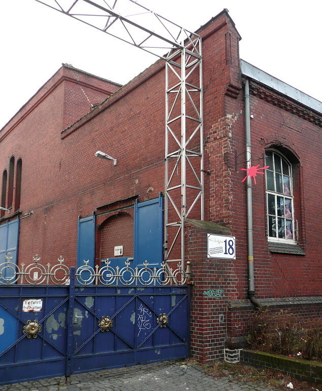 Klecks Theater Hannover Eingang